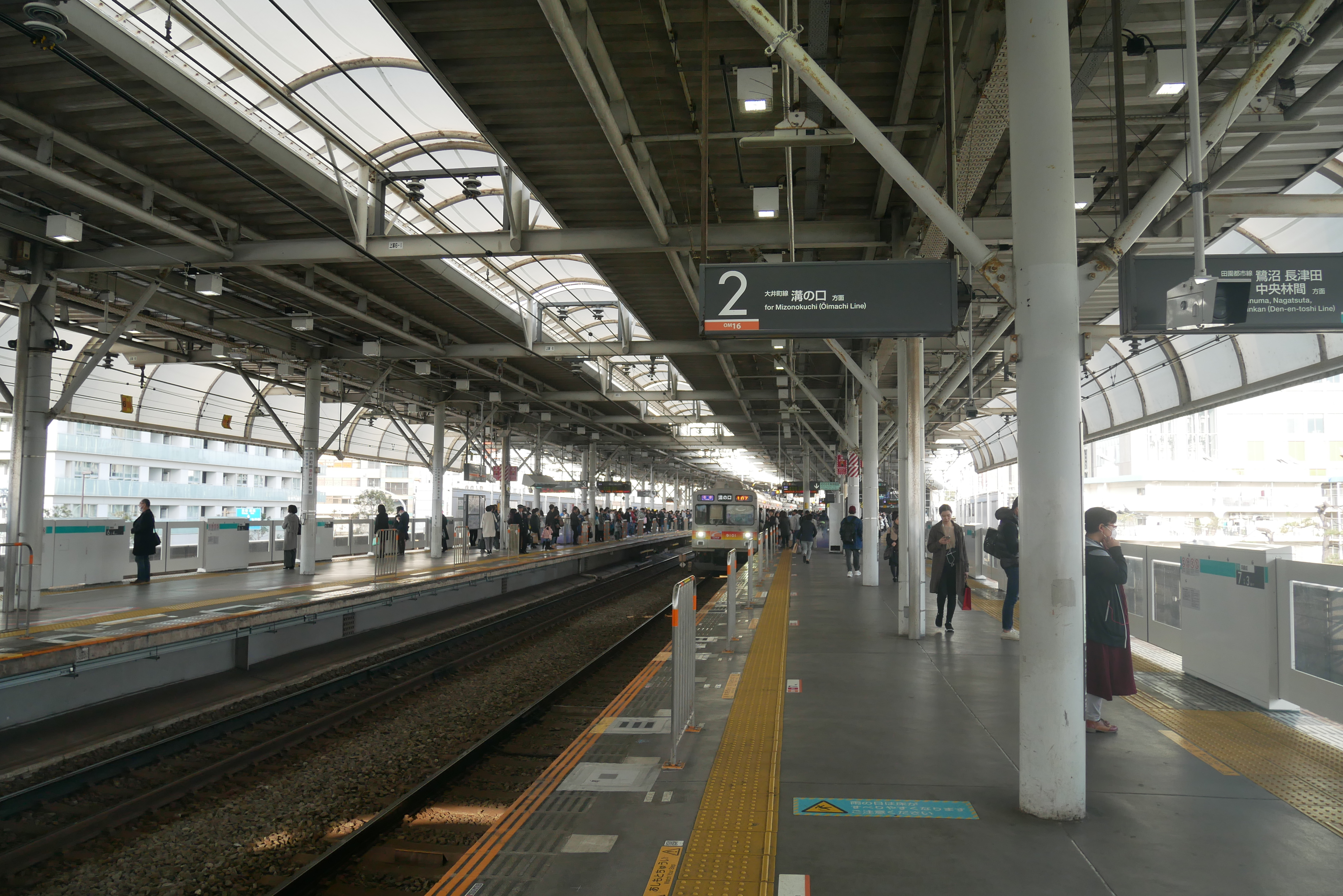 Futako-Tamagawa Station platforms (二子玉川駅のホーム)